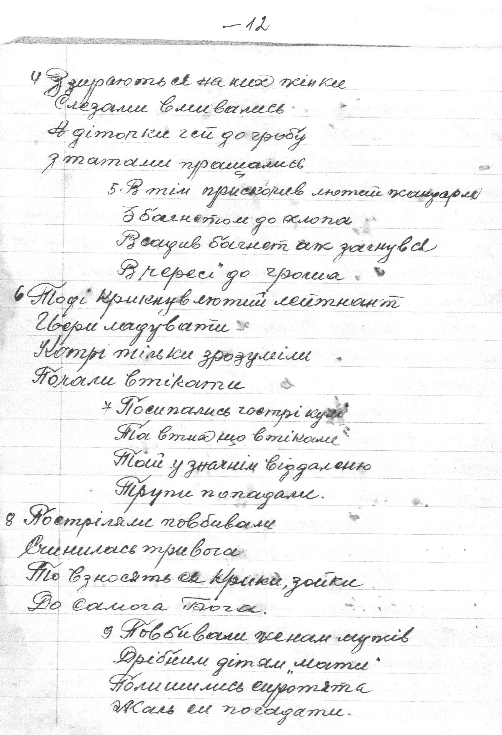 Копія рукопису